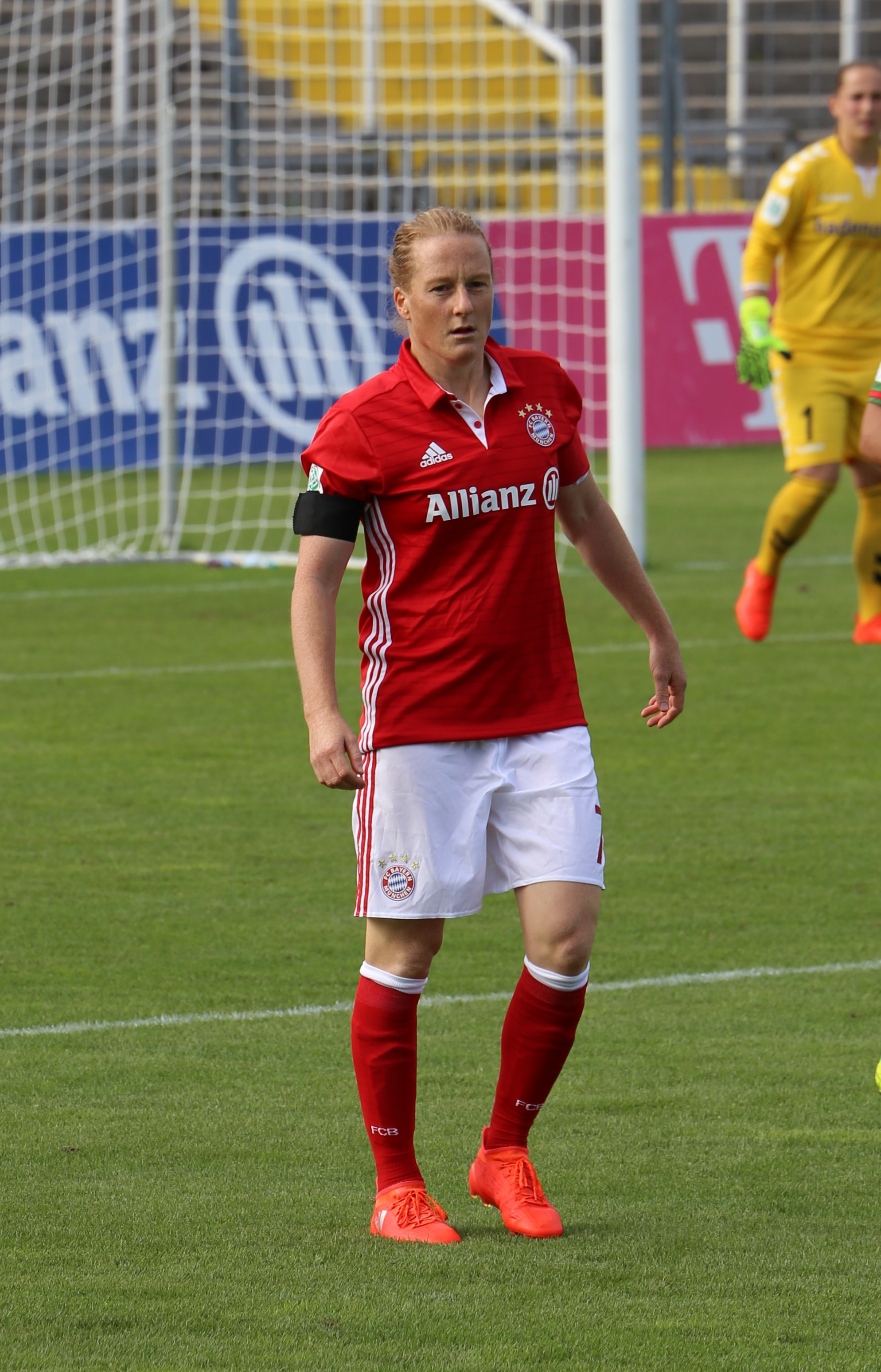 Melanie Behringer, FC Bayern München, beim Frauen-Bundesliga-Spiel FC Bayern München gegen SC Freiburg am 3. September 2016 im Stadion an der Grünwalder Straße (Ergebnis war 1:1).